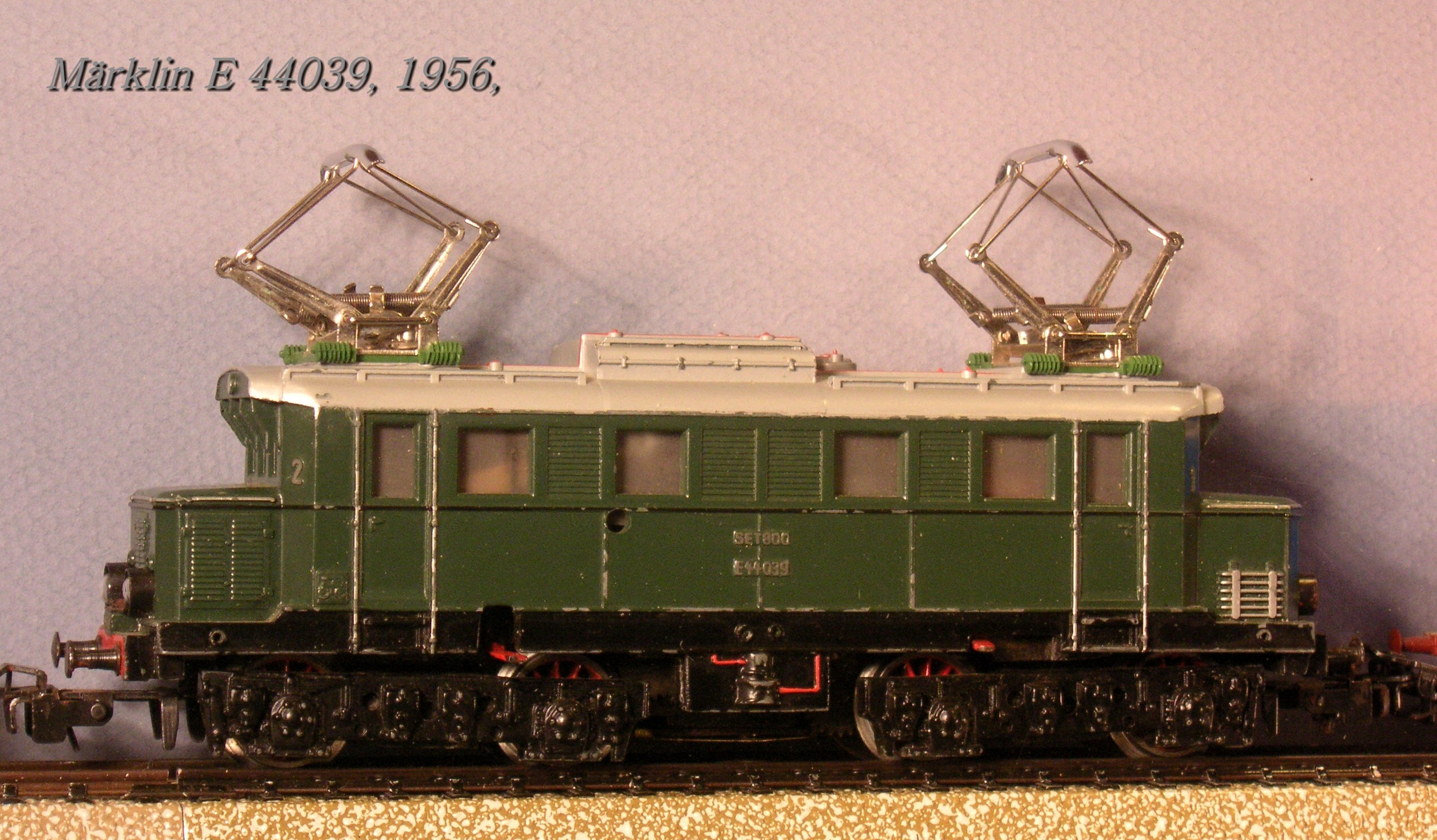 Märklin E-lok, katalog nr. 3011, 1956